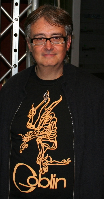 Claudio Simonetti in primo piano Claudio Simonetti